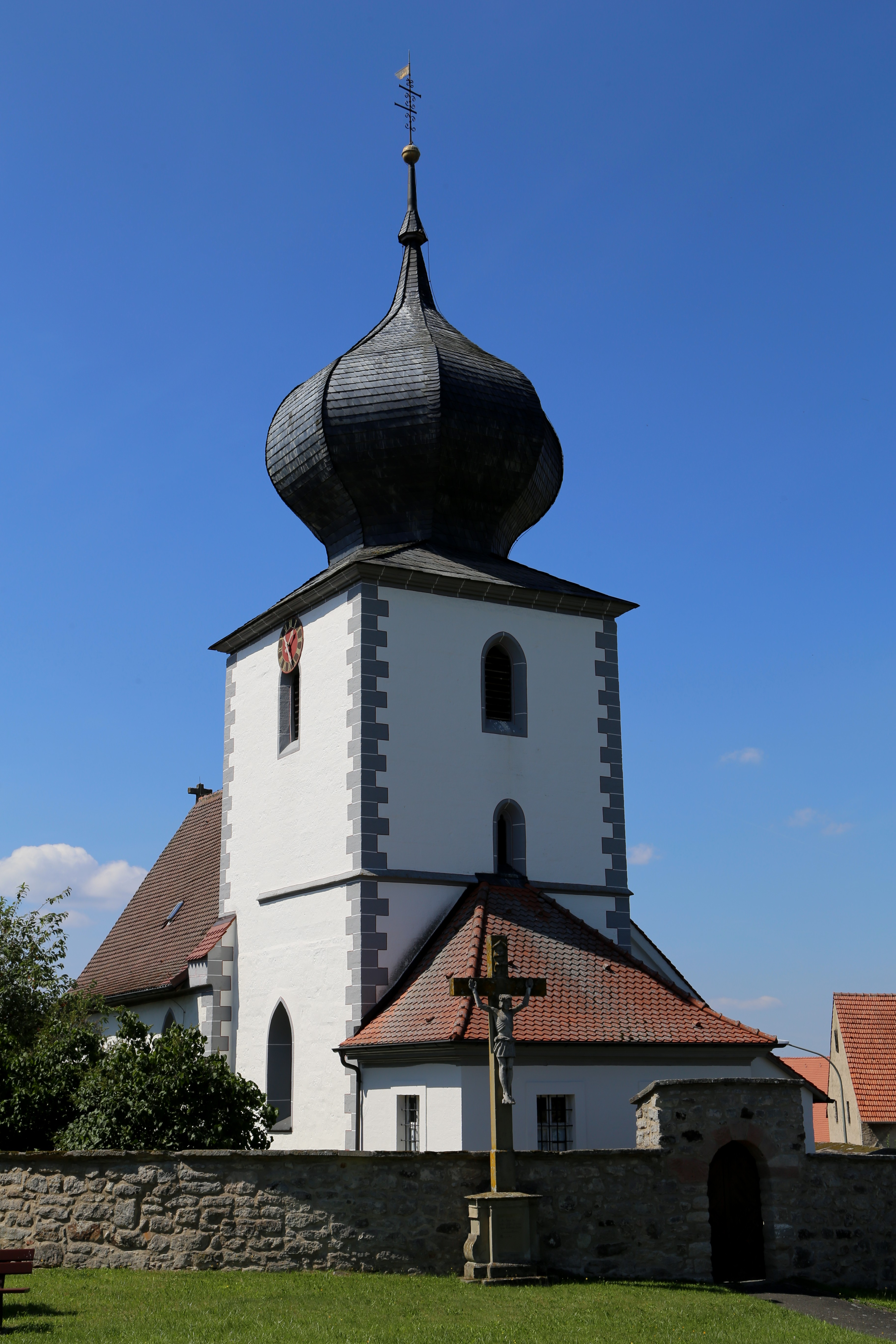 Ailersbach, Höchstadt an der Aisch; Katholische Filialkirche St. Martin, gotische Chorturmanlage mit barocker Zwiebelhaube und gotischem Langhaus, auf der Nordseite ein Sakristeianbau, Mitte 15. Jahrhundert, Barockisierung zweite Hälfte 18. Jahrhundert; mit Ausstattung